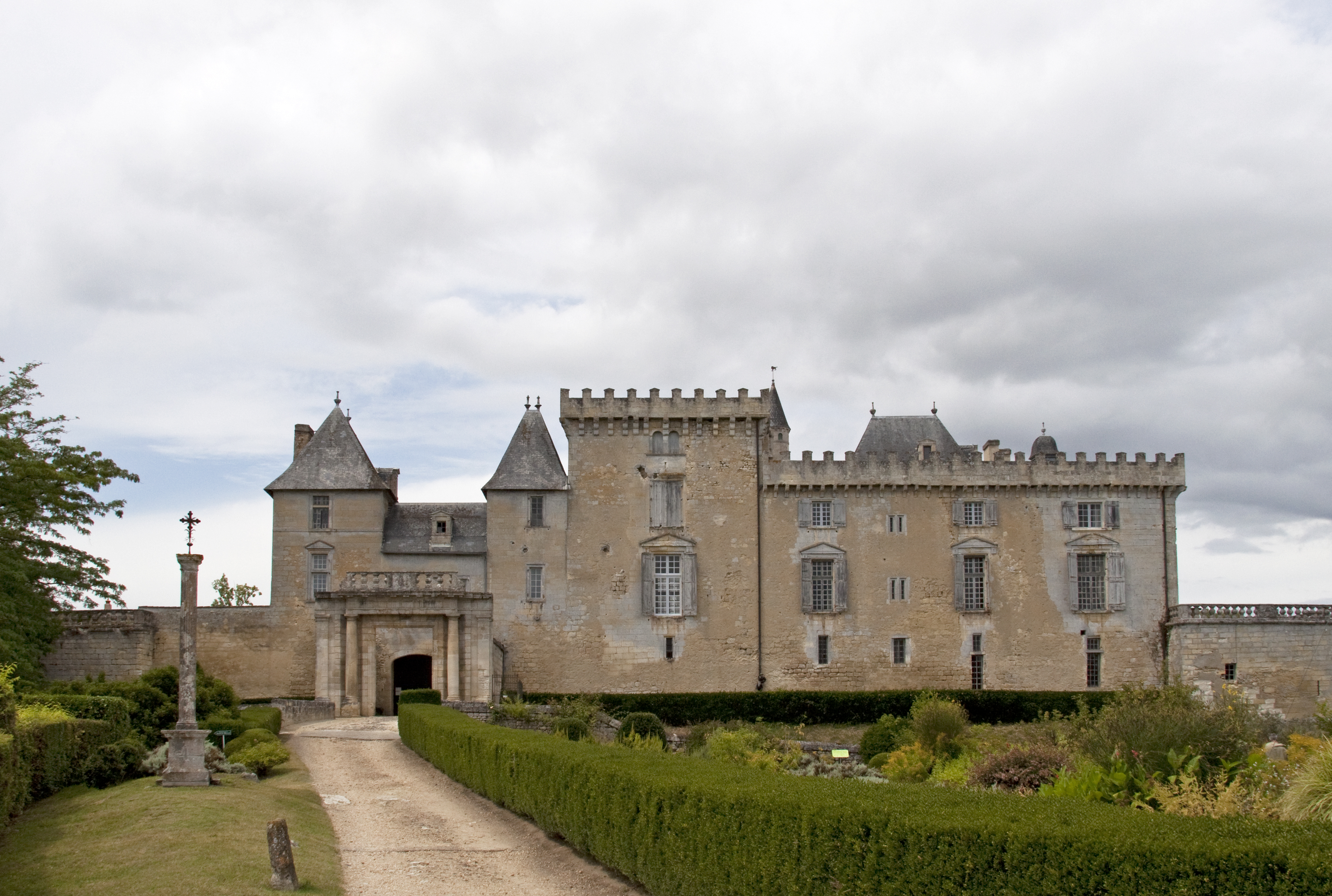 Chateau de Vayres